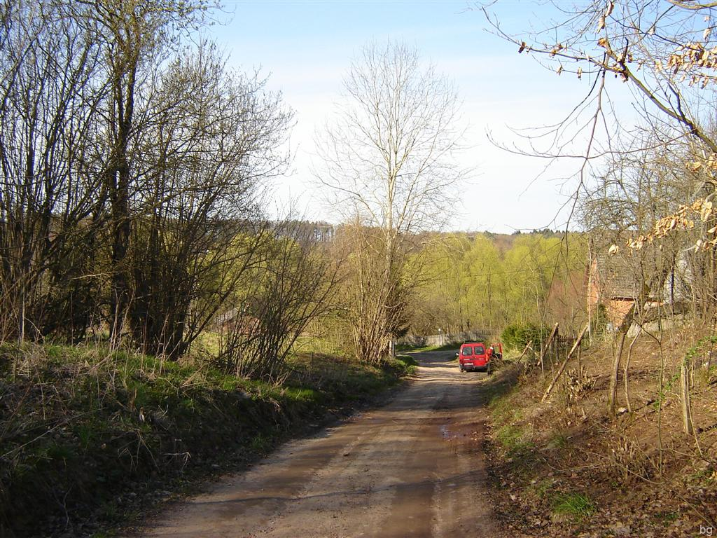 Wjazd do osady.